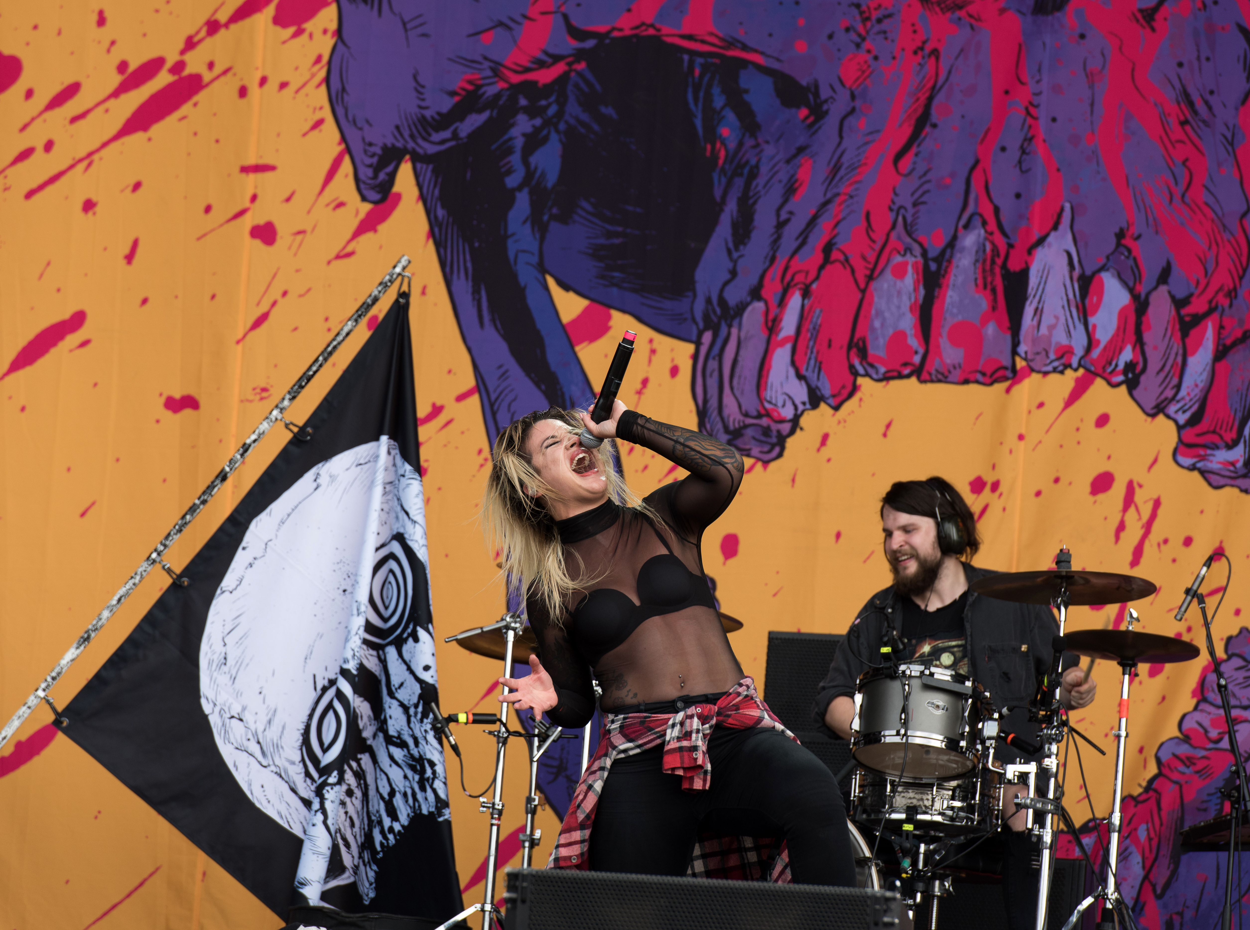 The Charm the Fury live beim Reload Festival 2017